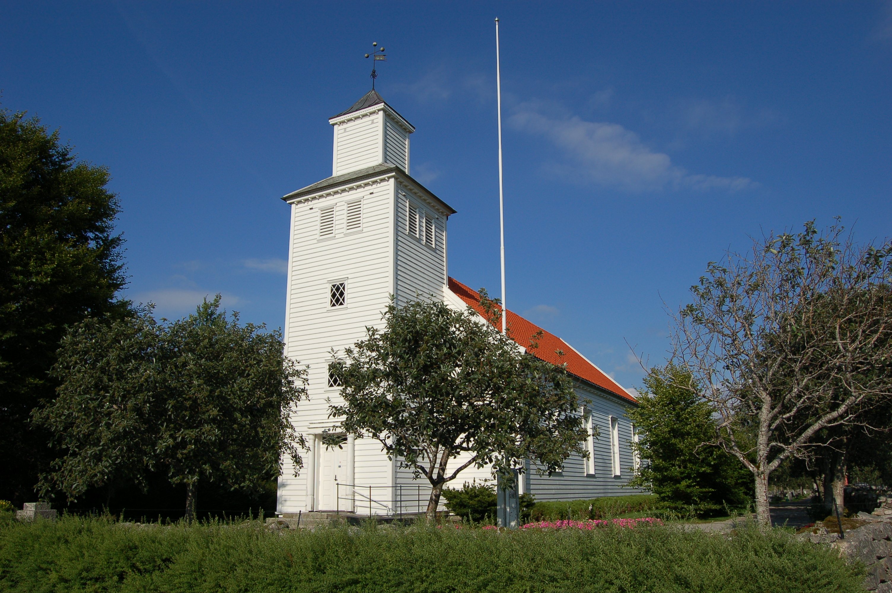 Gjesdal kyrkje (church), Norway